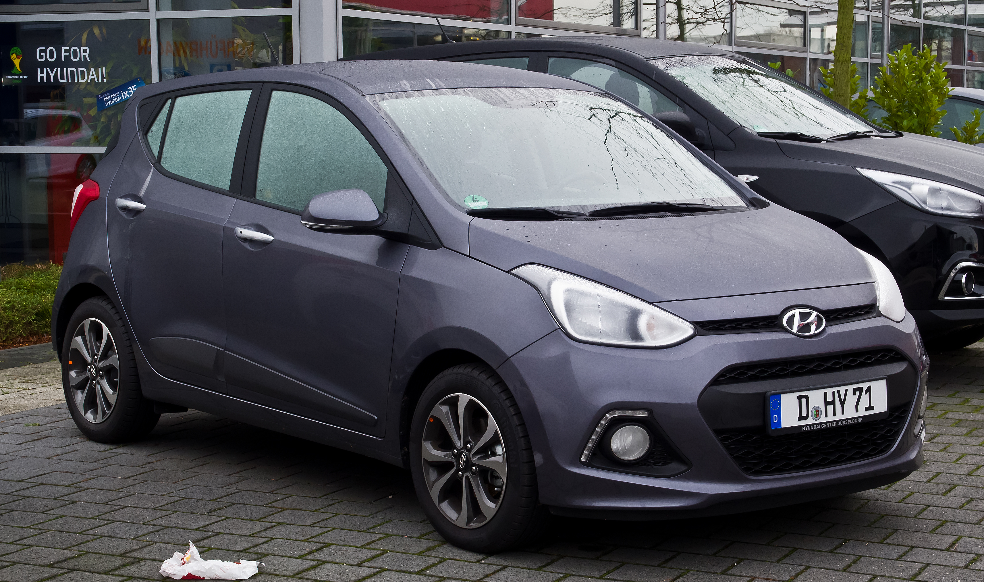 Hyundai i10 1.2 Style (II)